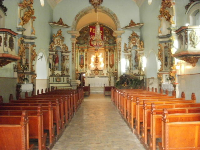 Corredor do Centro da Igreja Matriz de Andrelândia, visualizando Nossa Senhora do Porto da Eterna Salvação (no altar-mór) e o Sagrado Coração de Jesus Cristo.